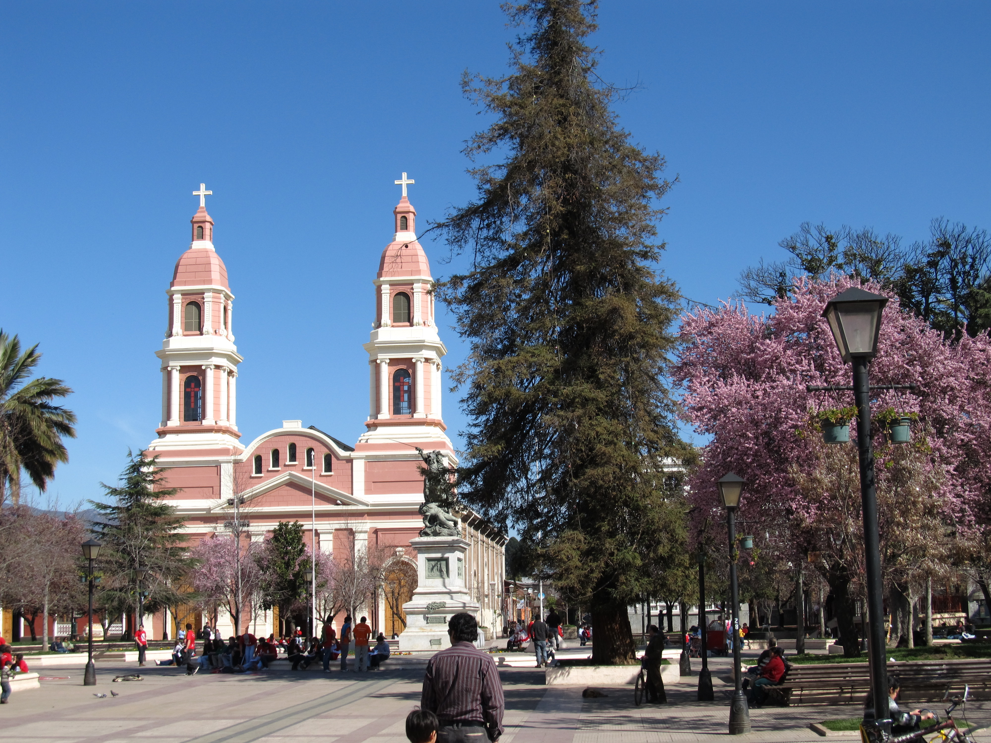 Plaza de Los Héroes de Rancagua This is a photo of a national monument in Chile: 377